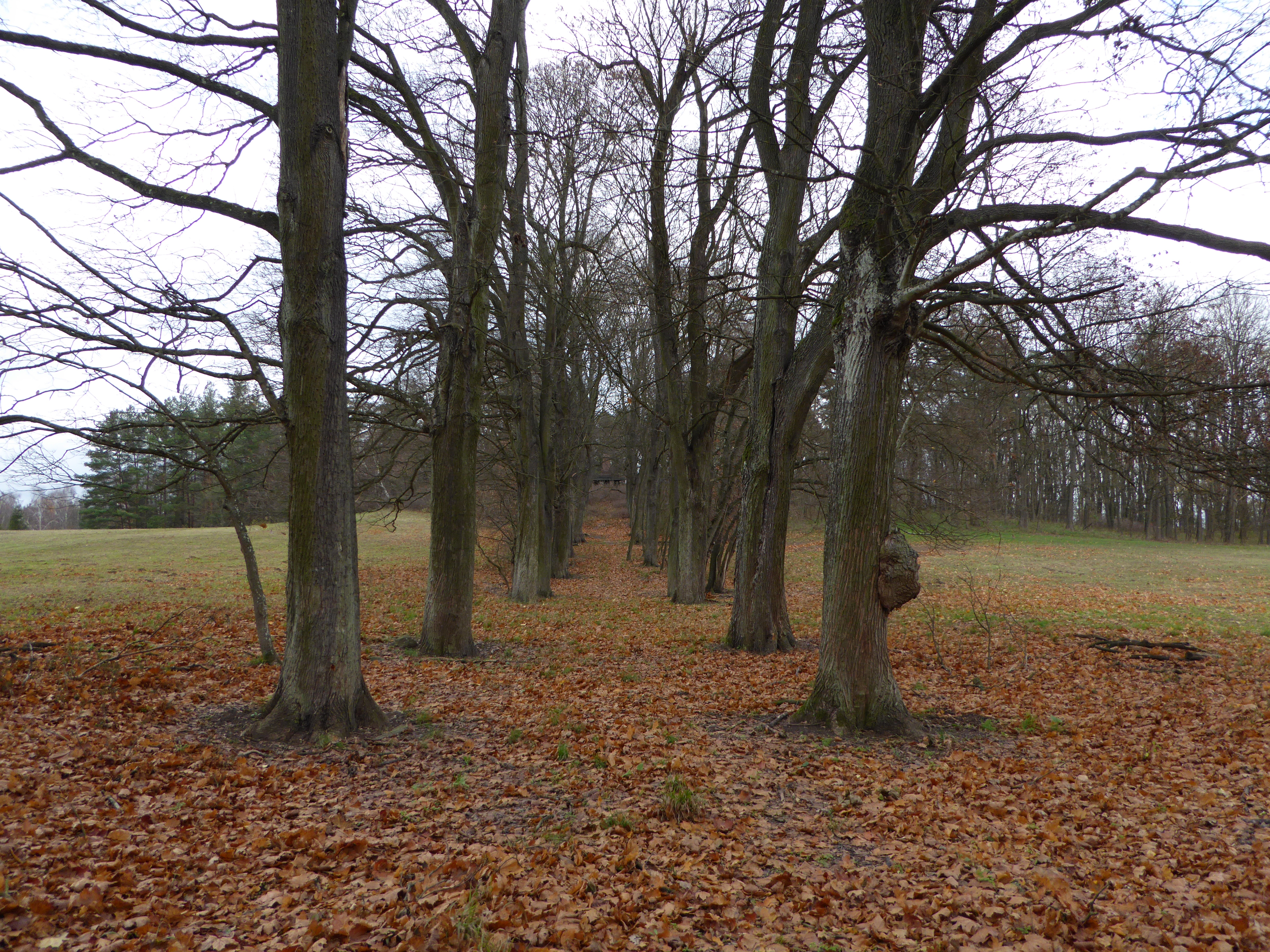 Ruine des Denkmals für die Gefallenen des Ersten Weltkrieges an der Kleinbahn zwischen Waldsieversdorf und Dahmsdorf (Müncheberg)